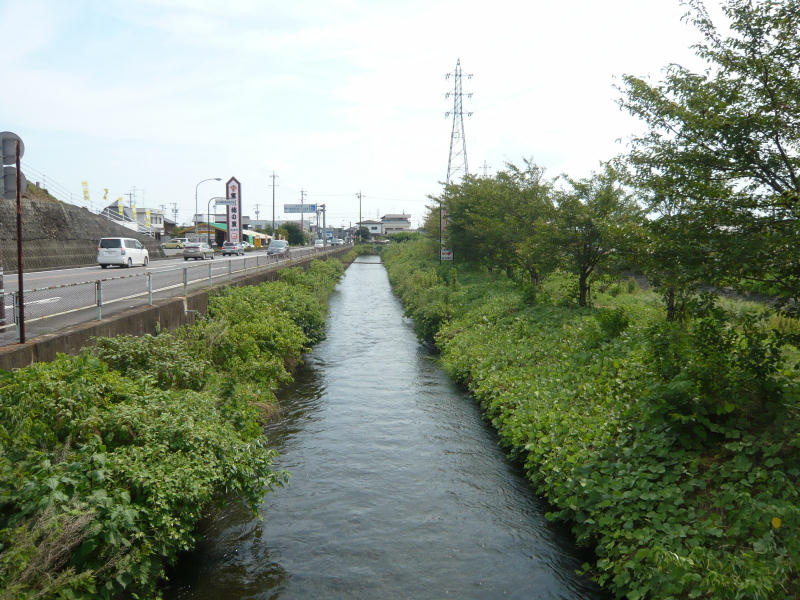 席田用水。道の駅富有柿の里いとぬき隣。